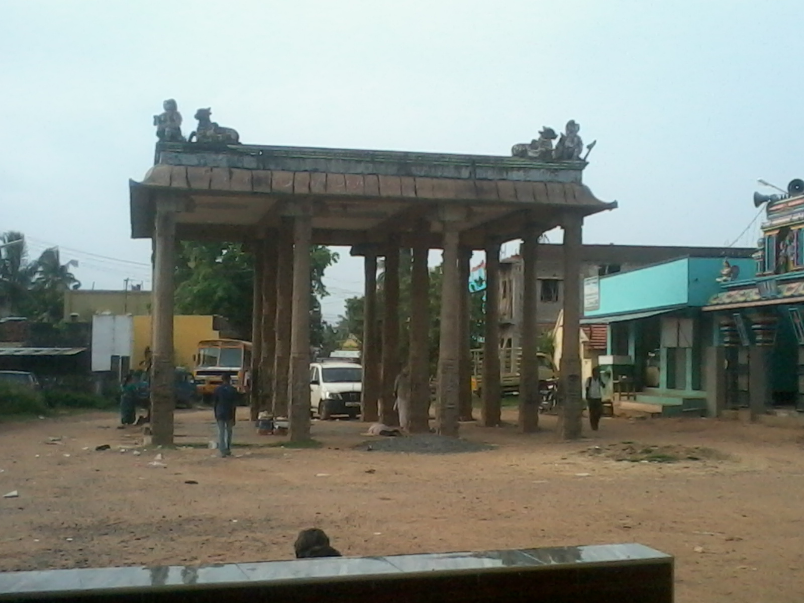 படக்காட்சிக்கு